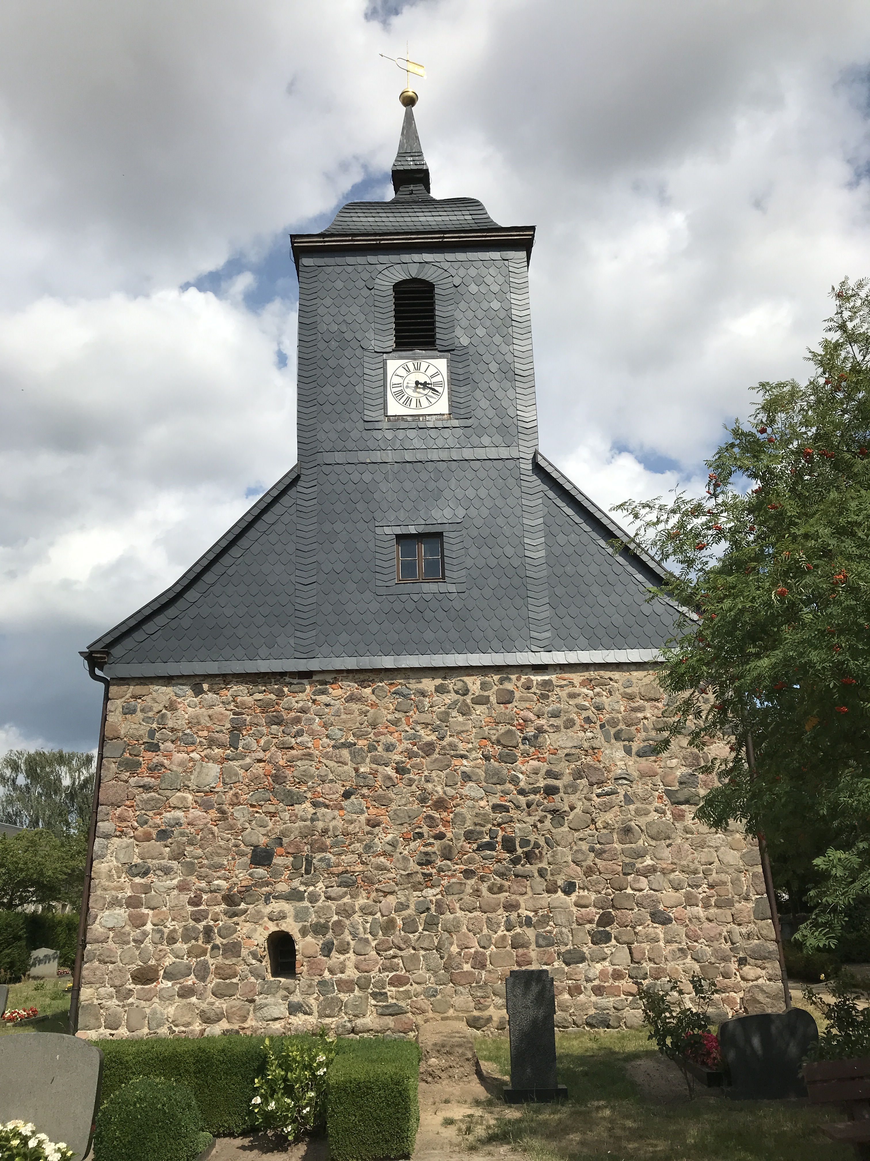 Die Dorfkirche Plötzin ist eine im Kern romanische Feldsteinkirche aus dem 13. Jahrhundert in Werder (Havel) im Land Brandenburg